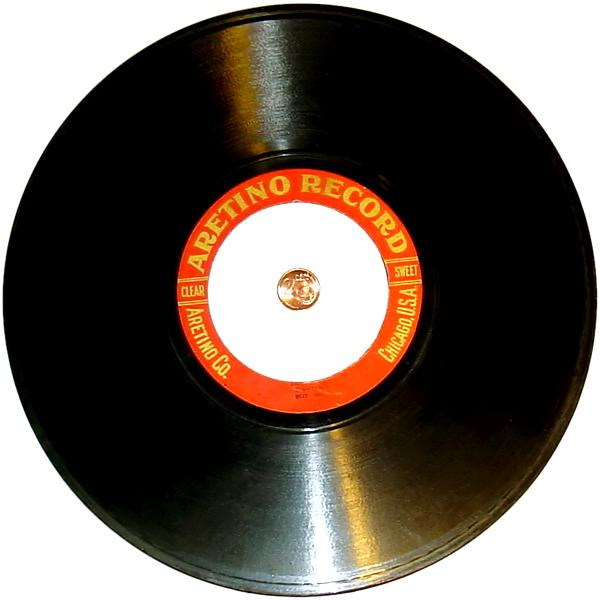 Aretino-Schellackplatte mit übergroßem Mittelloch, ca. 1907-14